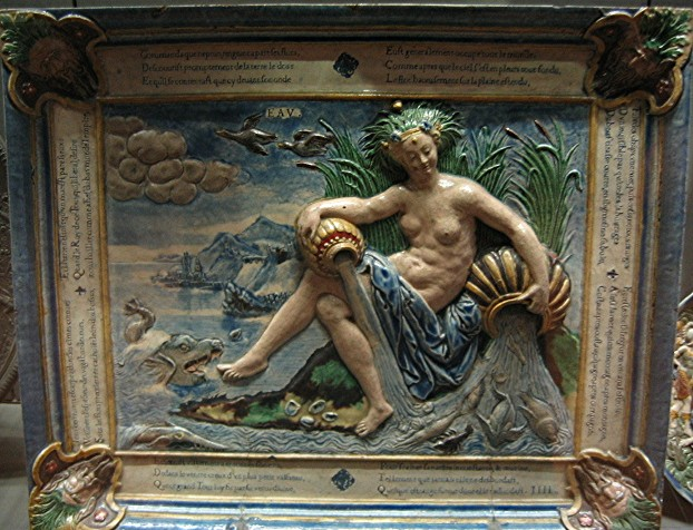 Allégorie de l'eau inspirée d'une gravure de Sadeler d'après Marine boutillier . Texte d'après La Sepmaine ou Création du monde de Guillaume du Batas (1578).